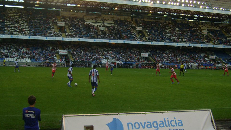 Partido disputado entre el Deportivo de La Coruña y el Atlético de Madrid.